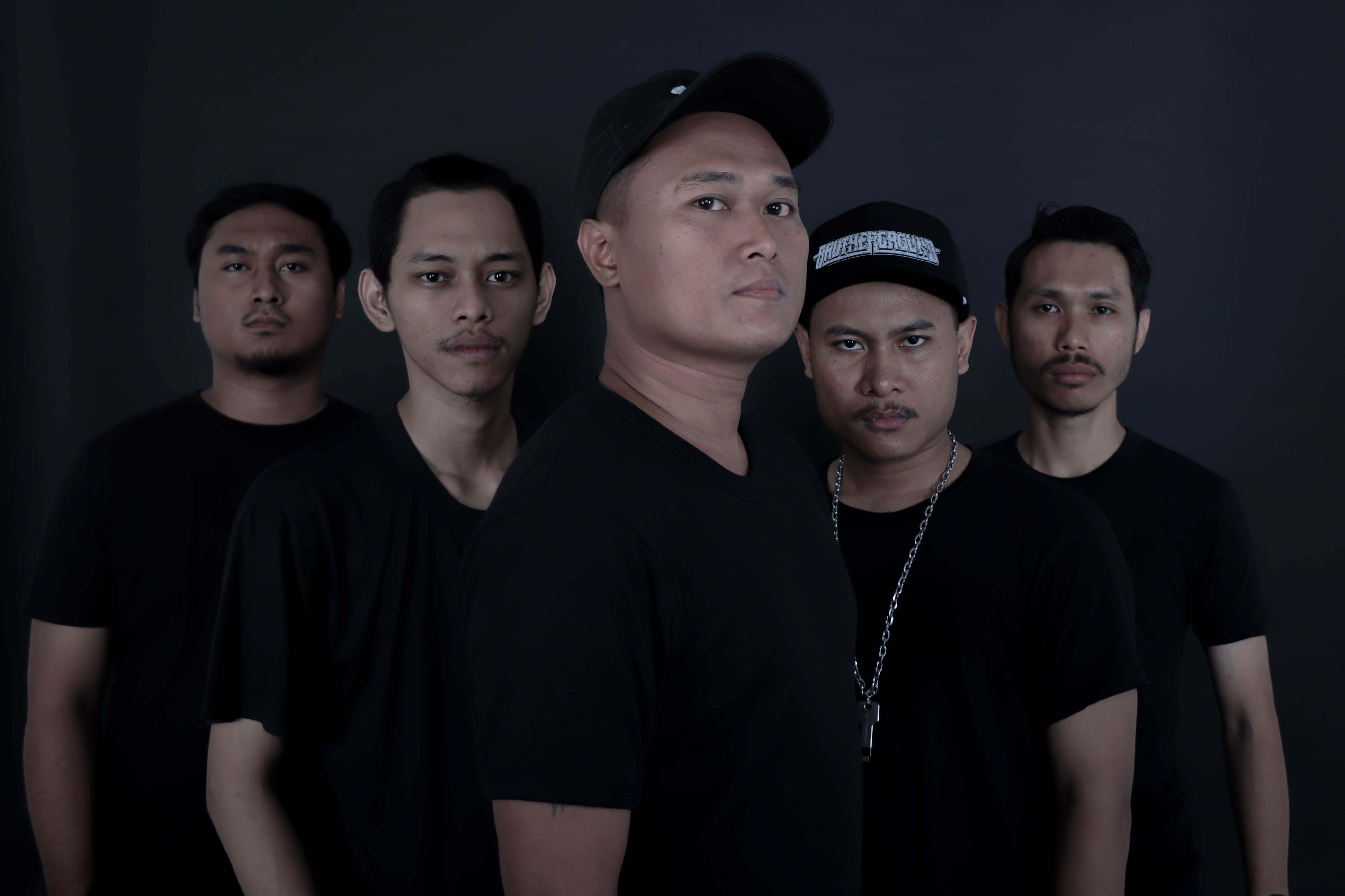 Dari kiri ke kanan: Kordes, R. Wiryawan SK, Bayu Karna, Cak Boker dan Fajar Ainurrofiq.